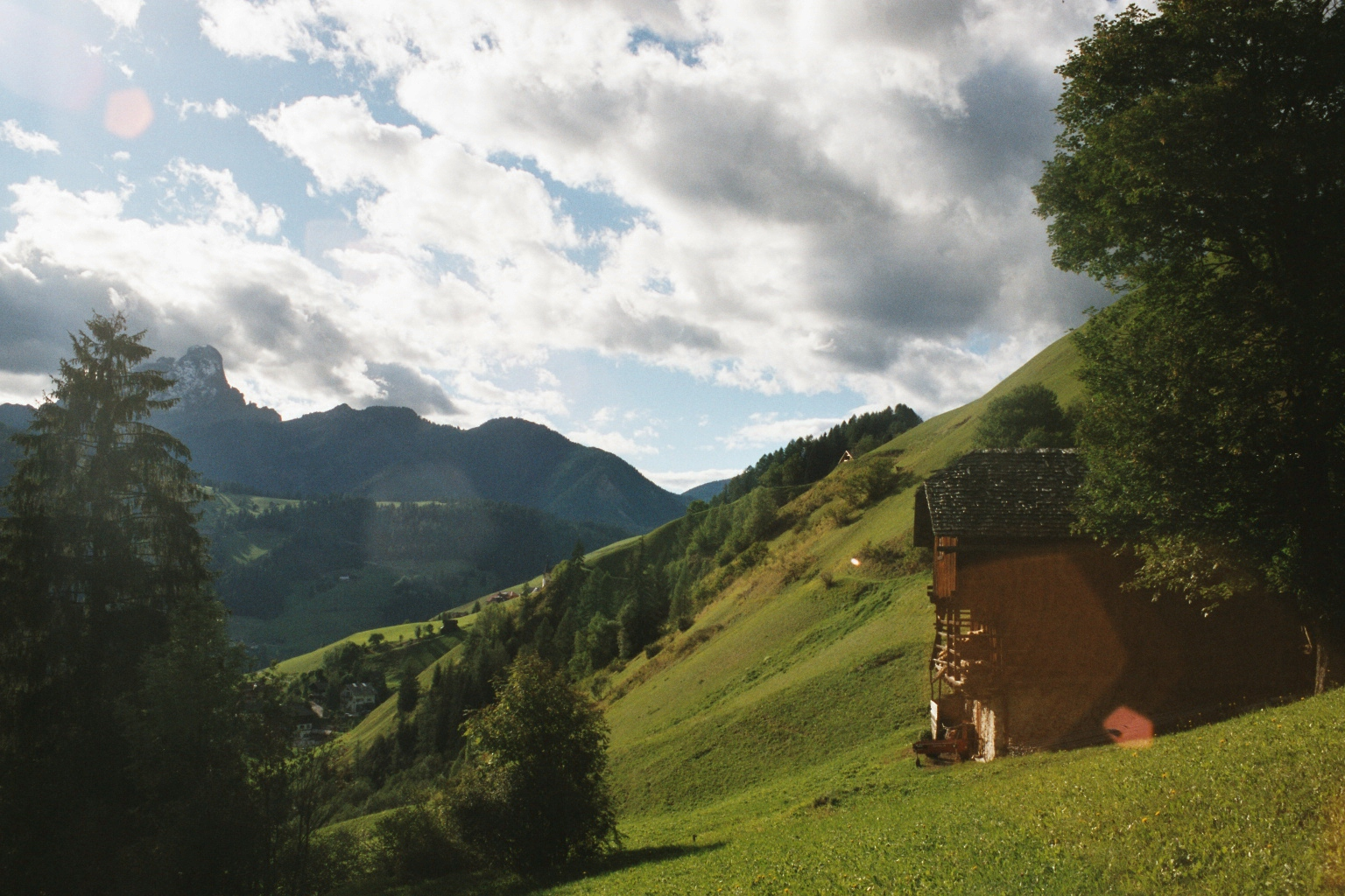 Hütte in Wengen mit Peitlerkofel selbst aufgenommen am 18. September 2003